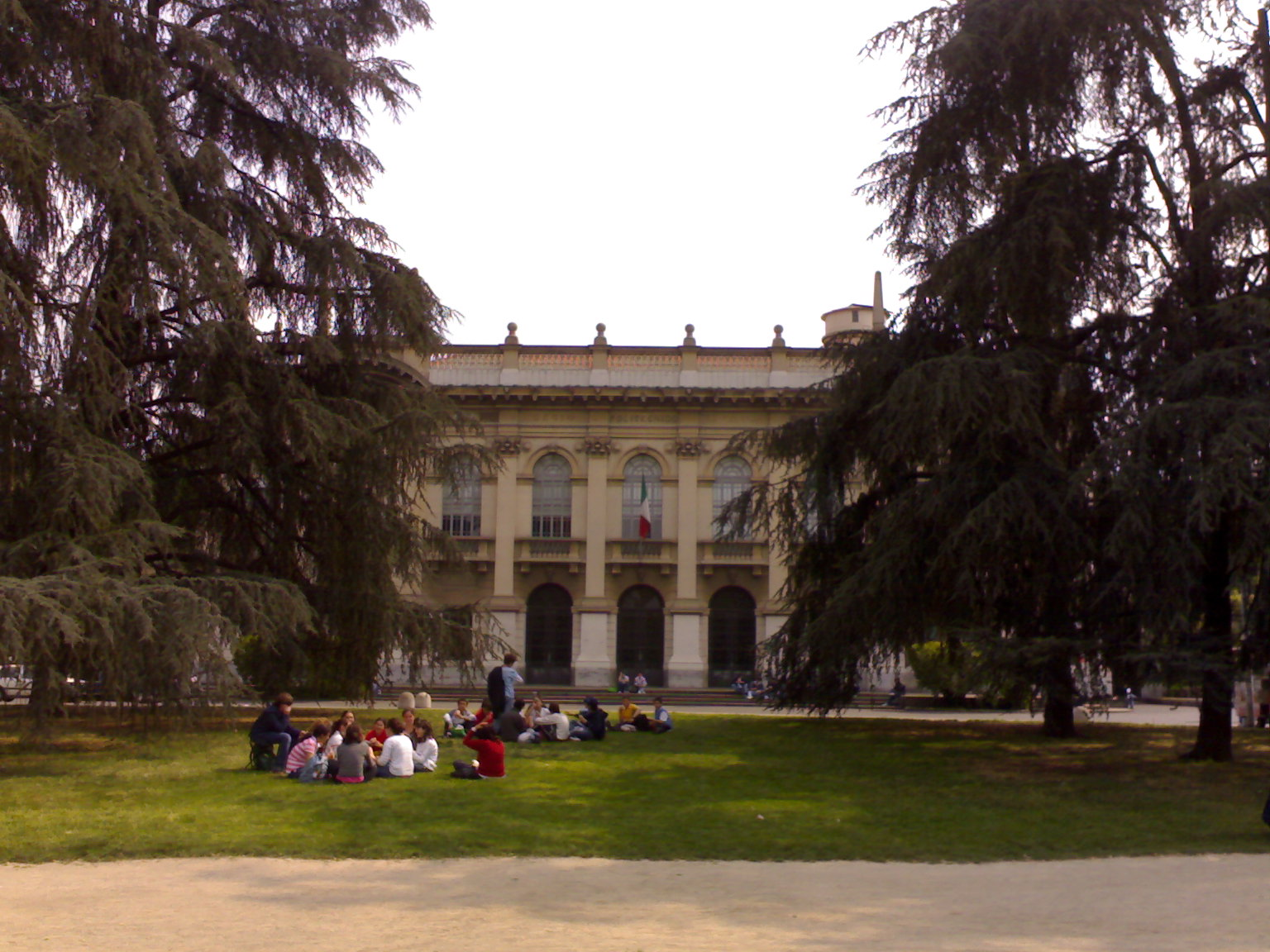 Politecnico di Milano, facciata.